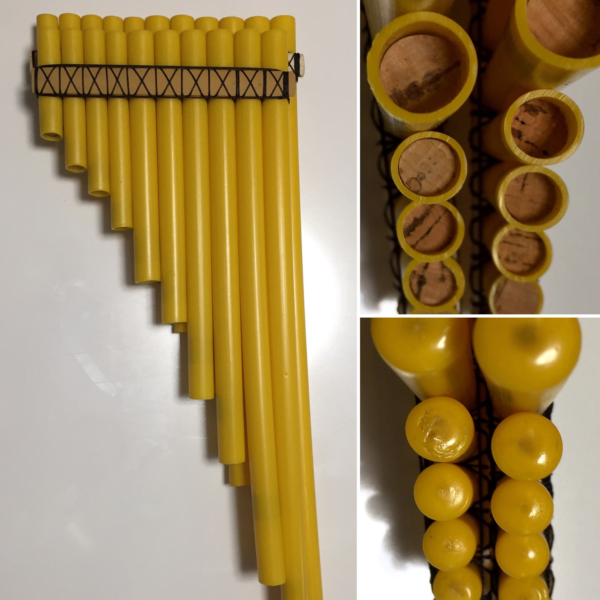 サンポーニャの底部構造の差異 右上：コルク式、調律棒を用いて調律上下可能 右下：底部固定式、コメなどを入れることで上方向のみ調律可能